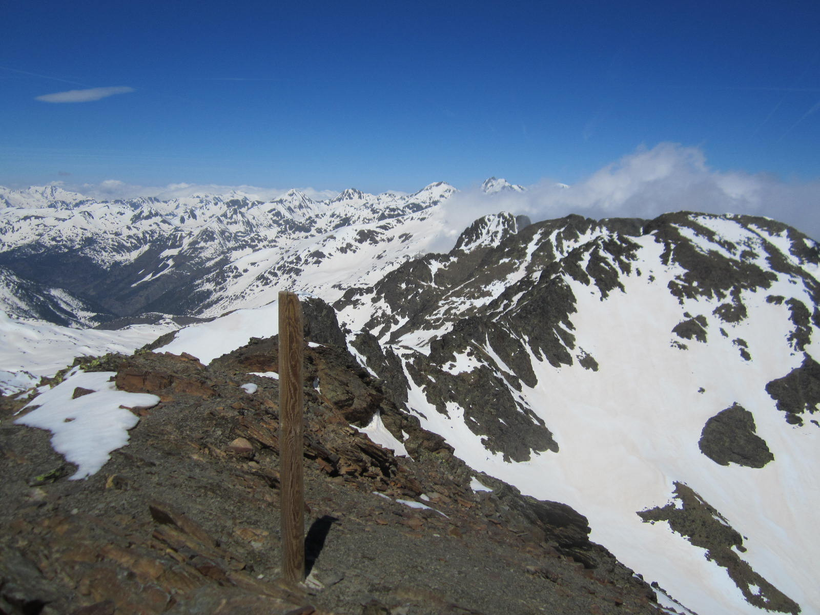 Valls del Comapedrosa (la Massana). Vistes des del Pic del Comapedrosa, amb la Pica d'Estats al fons. Coordenades: 42º35'34"N 1º26'41"E This is a a photo of a natural area in Andorra with id: AD-PNCVC